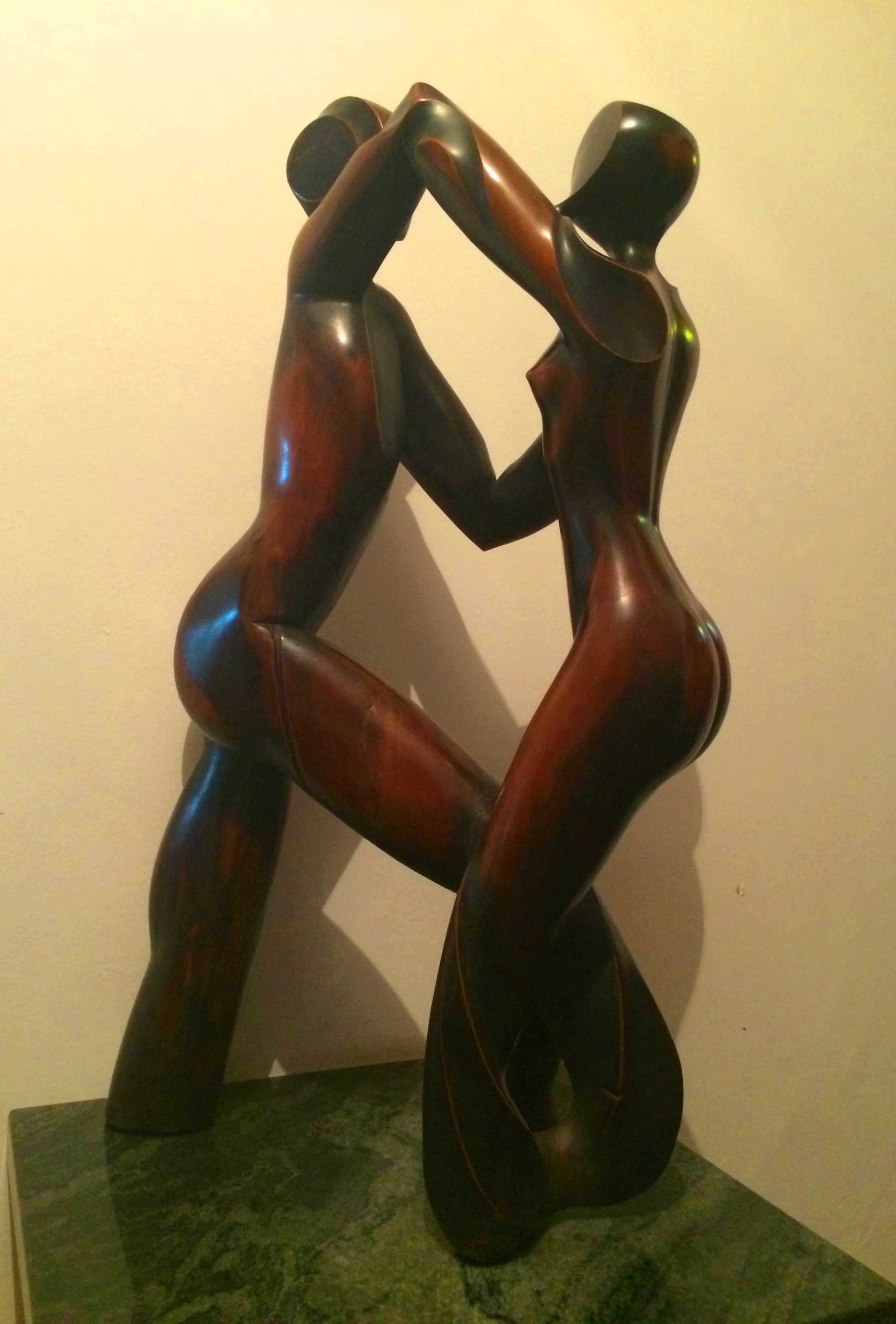 Escultura de João Oliveira, Desilusão, 2010, baseado no livro Vidas Secas de Graciliano Ramos. Medindo 80cm de altura.